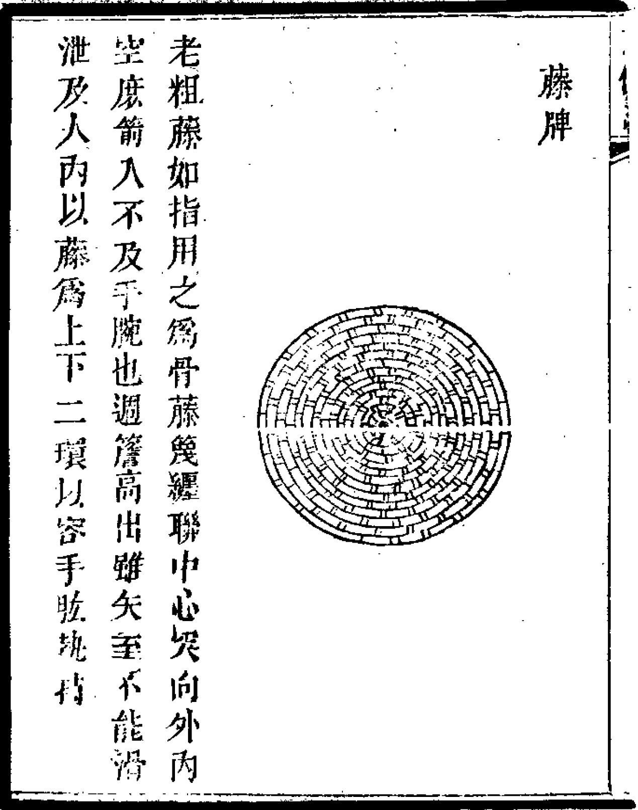 《武備志》卷一百四 藤牌